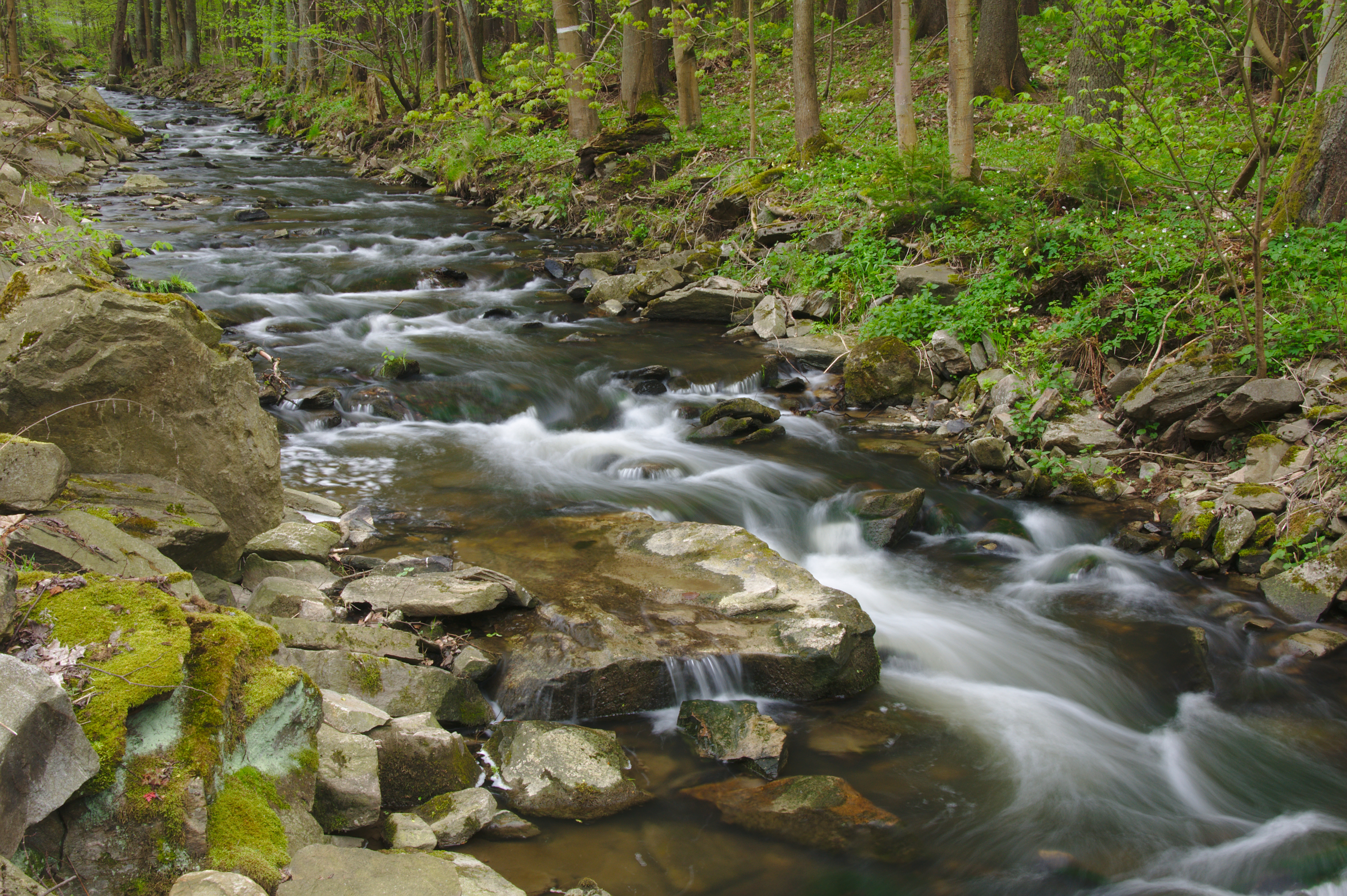 Přírodní rezervace Čepičkův vrch a údolí Hodonínky, okres Blansko